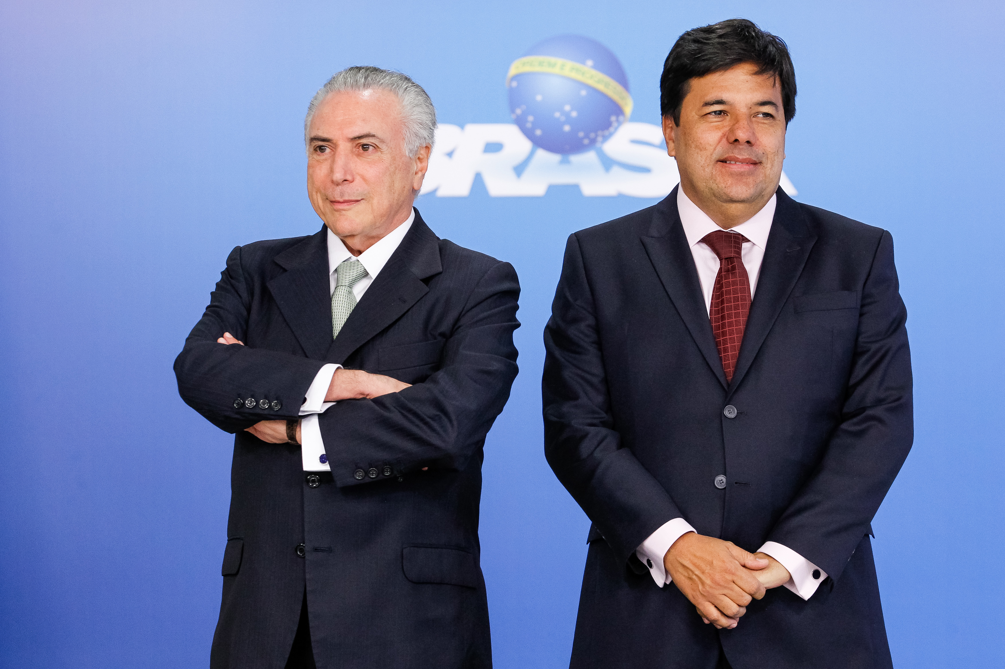 Brasília - DF, 16/06/2016. Presidente em Exercício Michel Temer durante ato de assinatura do edital do Fundo de Financiamento Estudantil - FIES 2016. Foto: Beto Barata/PR